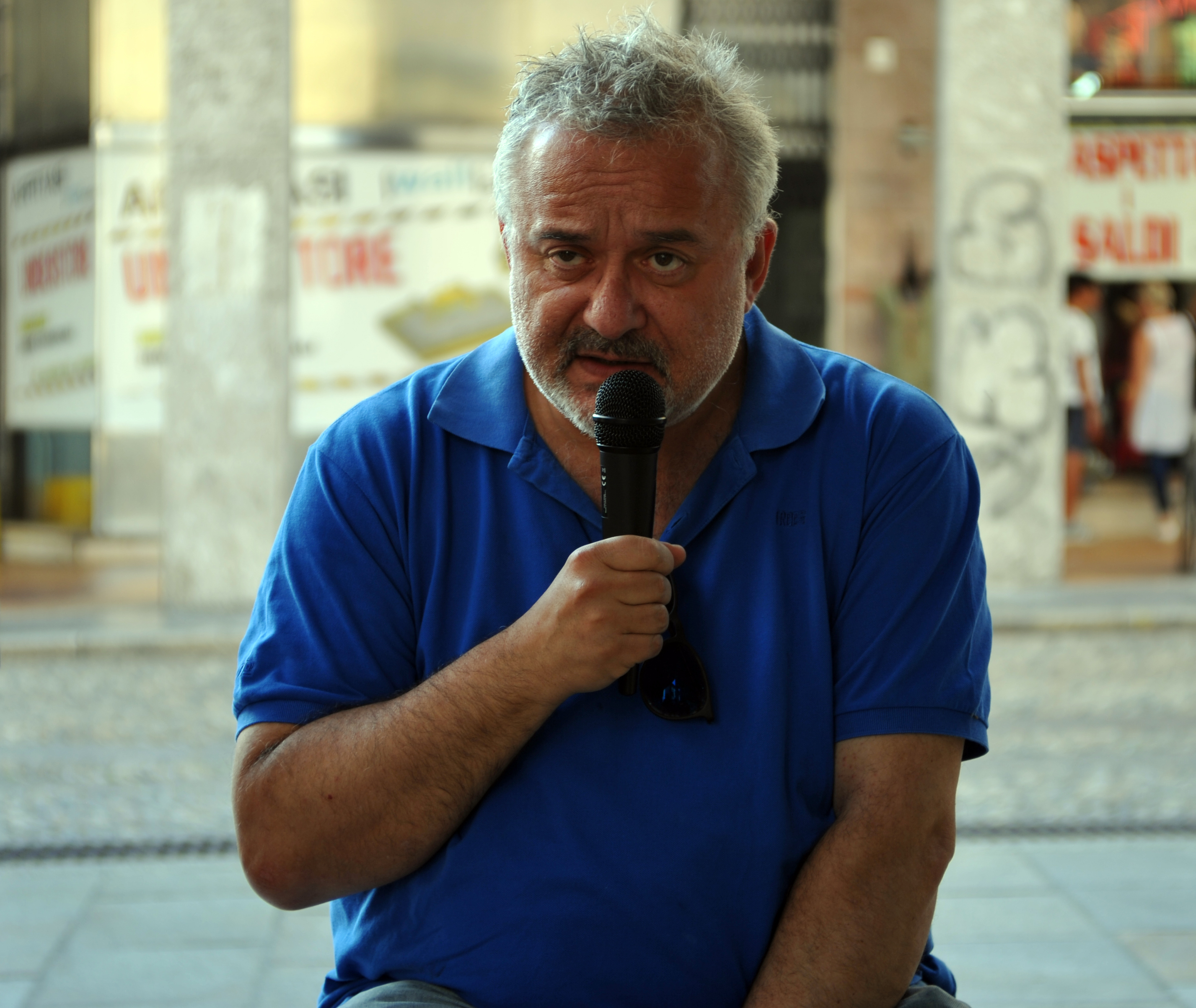 Lo scrittore Remo Bassini durante una presentazione in pubblico a Vercelli